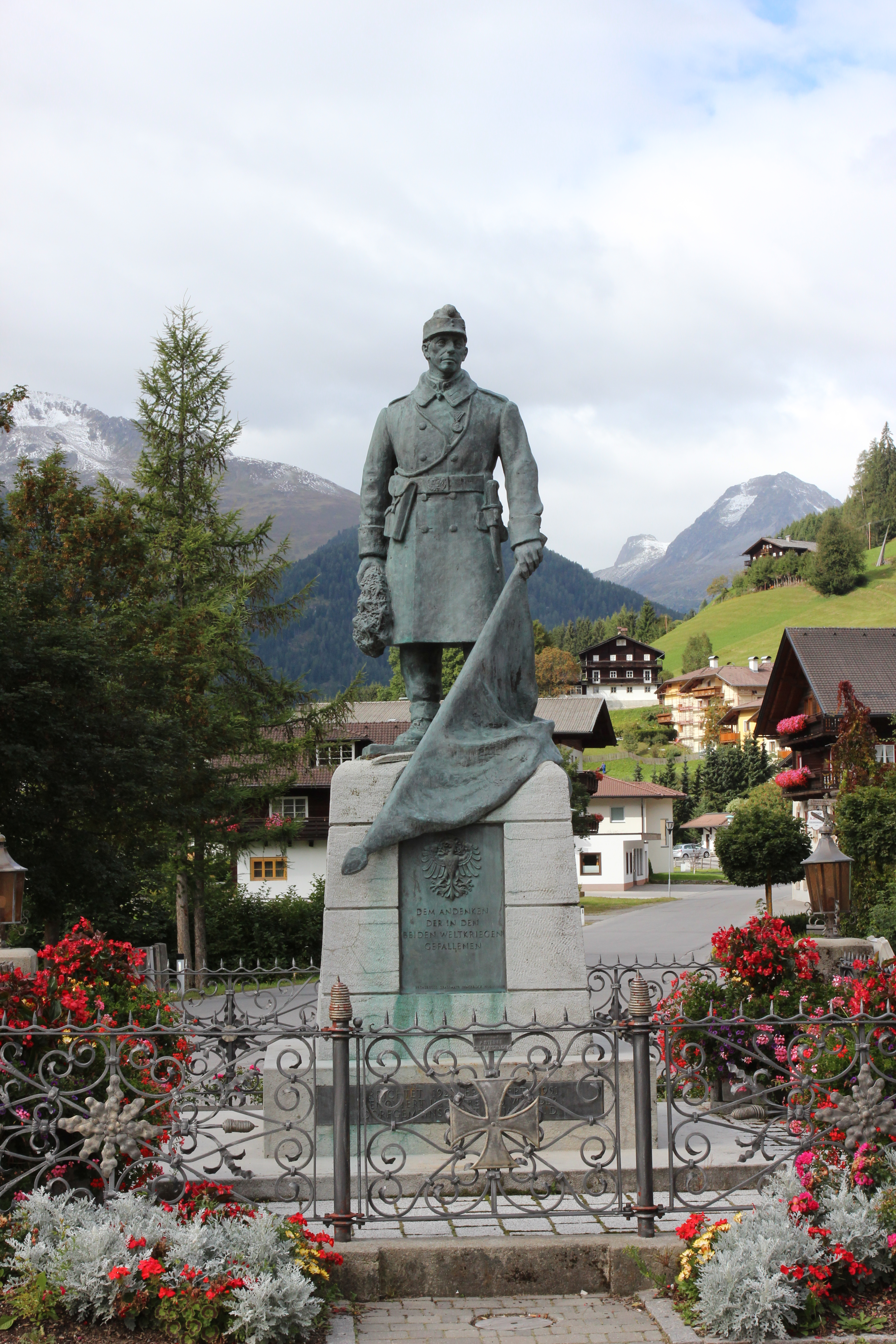 Kriegerdenkmal (St. Jakob in Defereggen), Österreich.